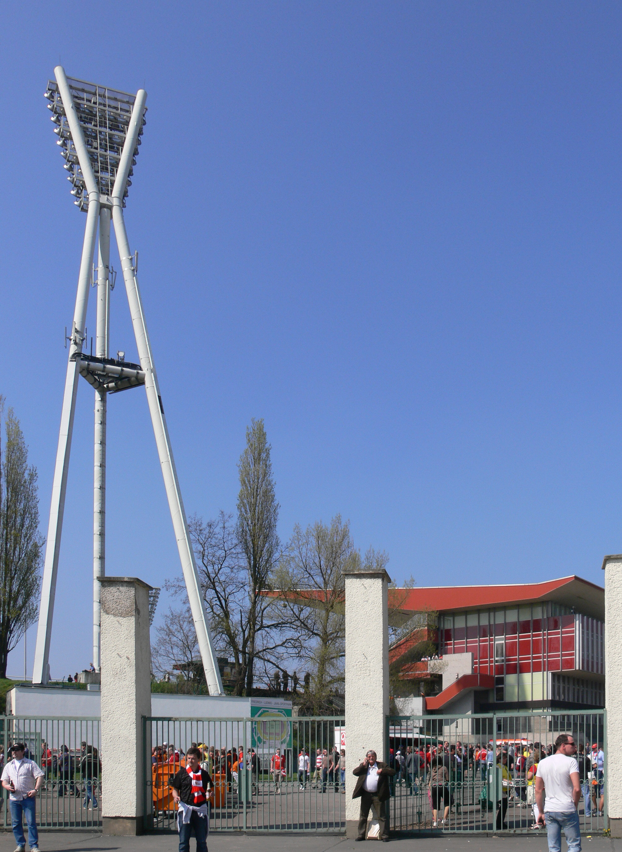 Berlin, Prenzlauer Berg, Friedrich-Ludwig-Jahn-Sportpark beim Spiel 1. FC Union Berlin – Stuttgarter Kickers